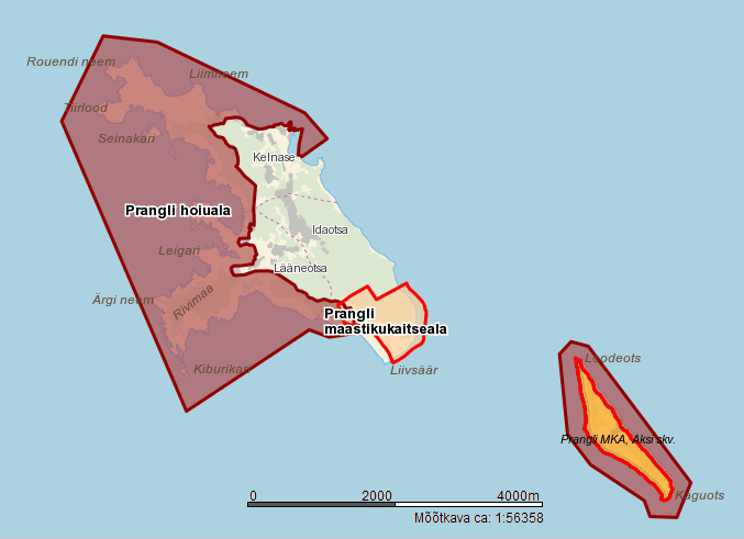 Prangli hoiuala ja Prangli MKA paiknemine kaardil. Põhineb Maa-ameti kaardil.